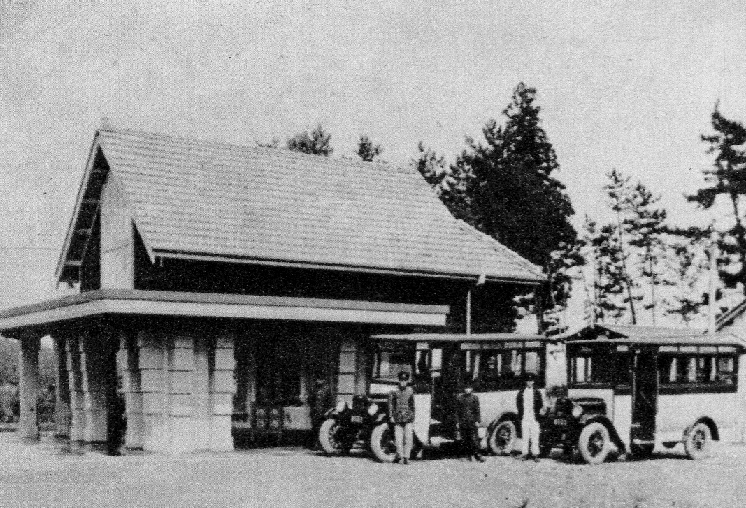 名古屋鉄道最初のバス路線が発着するライン遊園（現・可児川）駅前 昭和3年頃